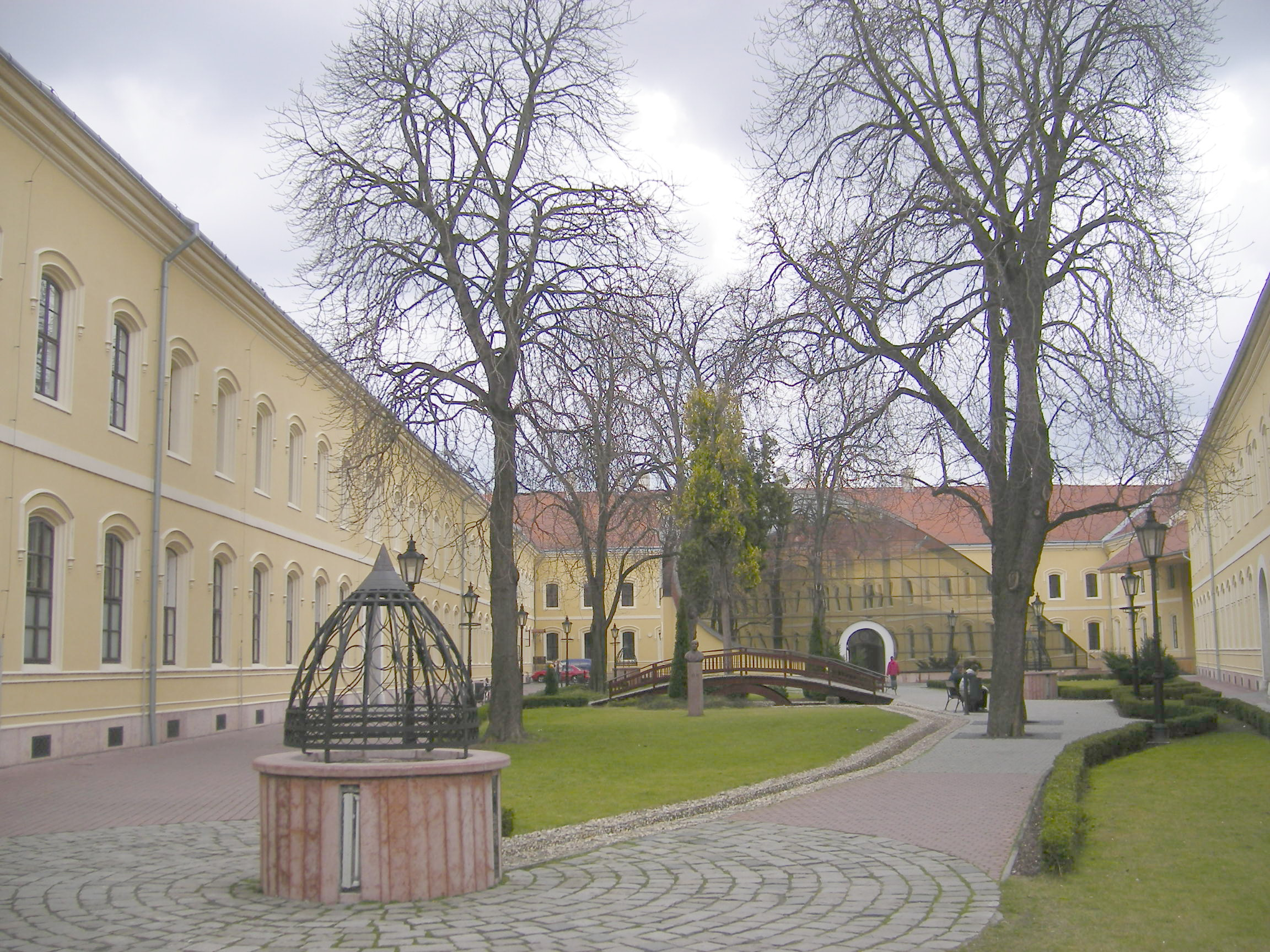 Komárom - a Tiszti pavilon udvara